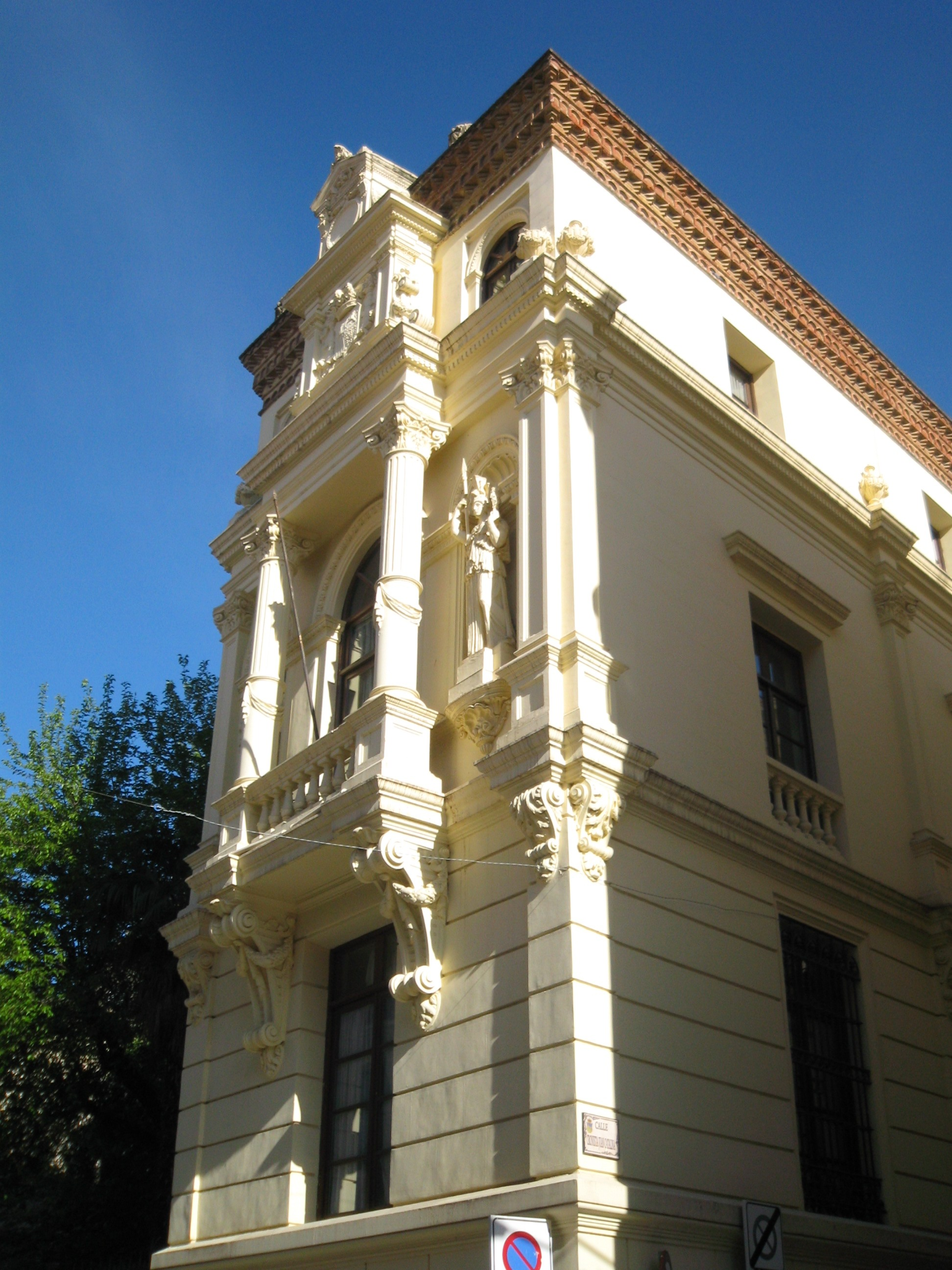 Convento de la Piedad in Guadalajara, Spain